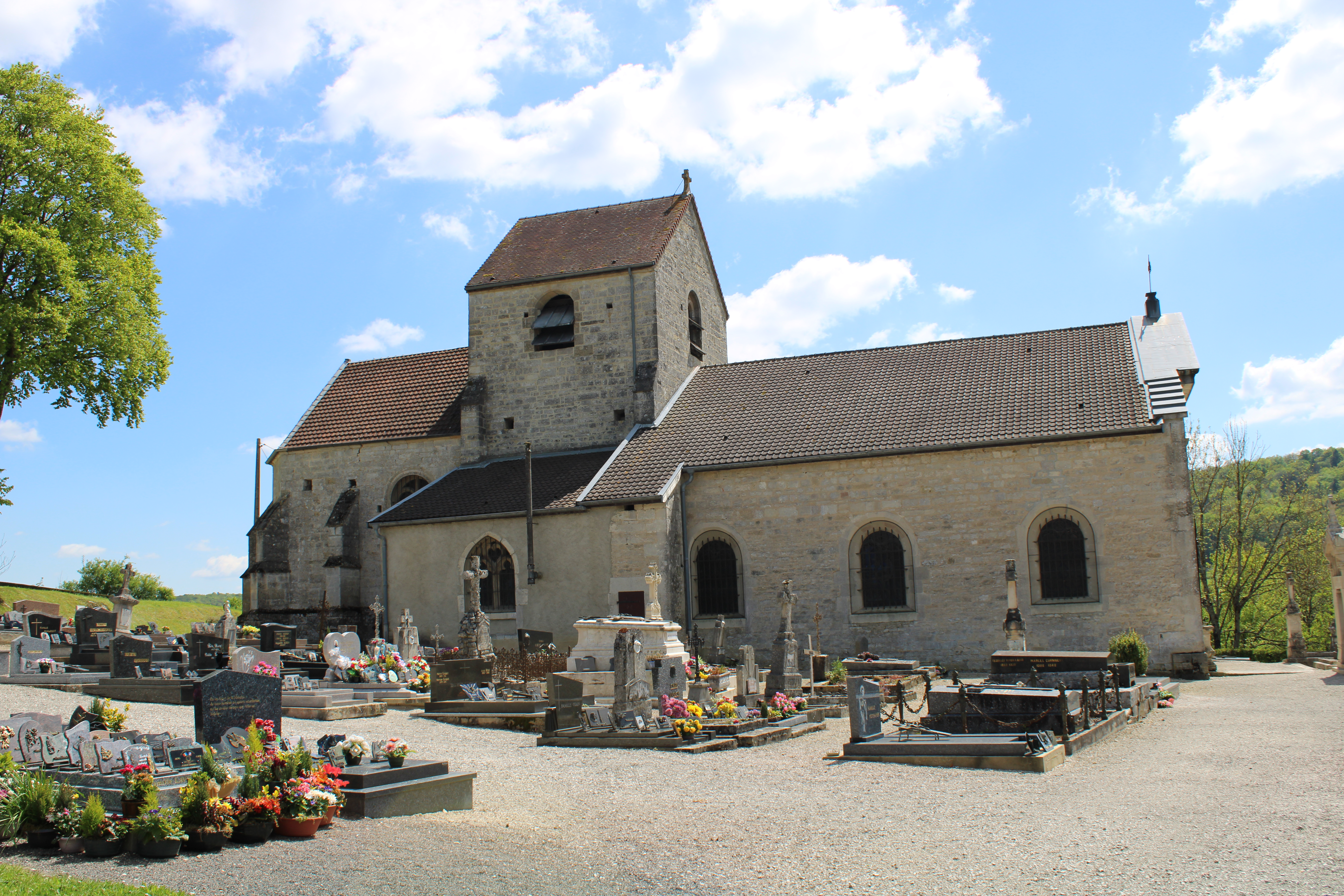 L'église au milieu du cimetière.